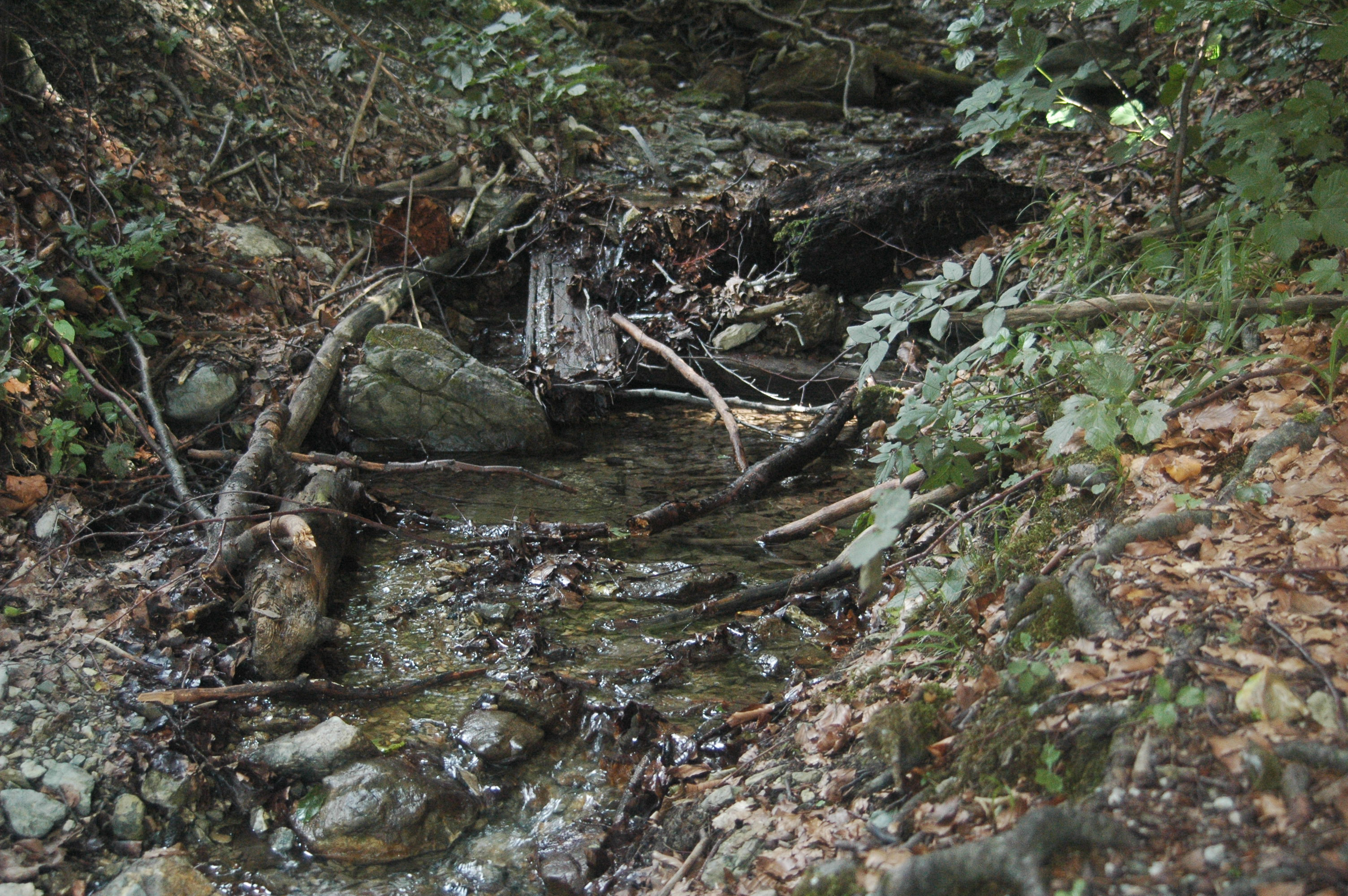 Nitra spring in Malá Fatra